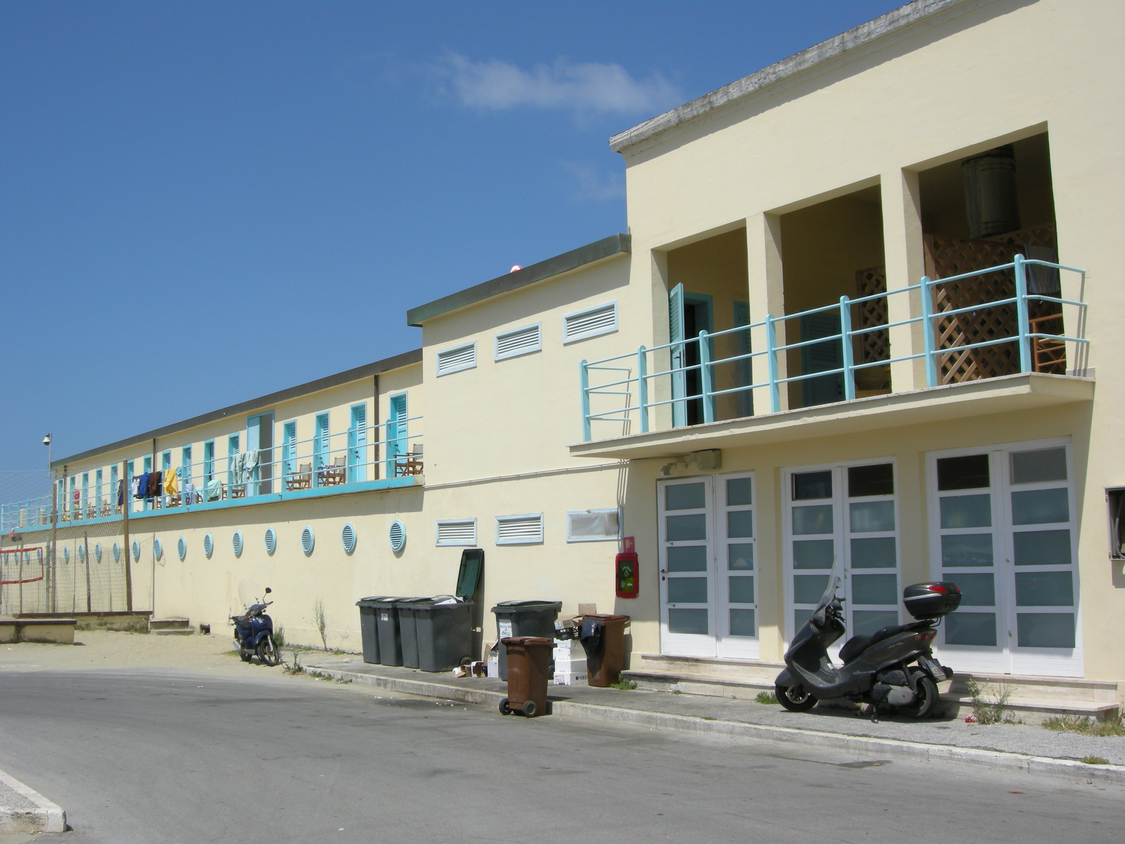 Bagno principe di piemonte